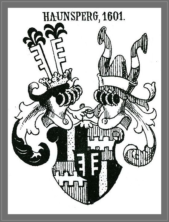 Verbessertes Wappen der Haunsperger von 1601